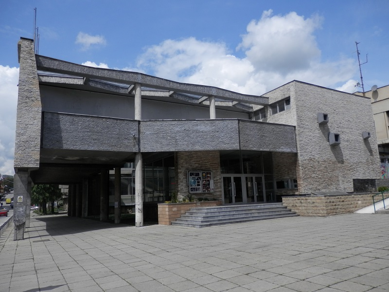 Narodno pozorište Užice